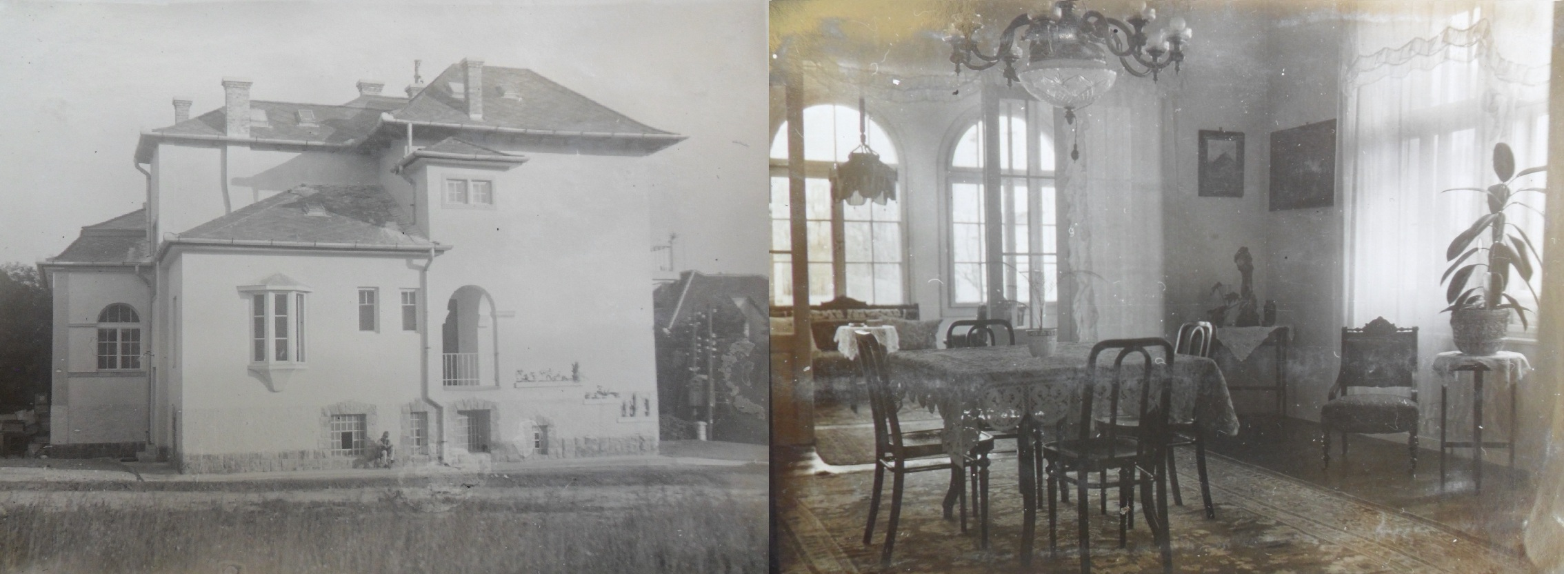 dr. Lux Gyula tanügyi tanácsos Orbánhegyi villája. Épült 1928-ban.